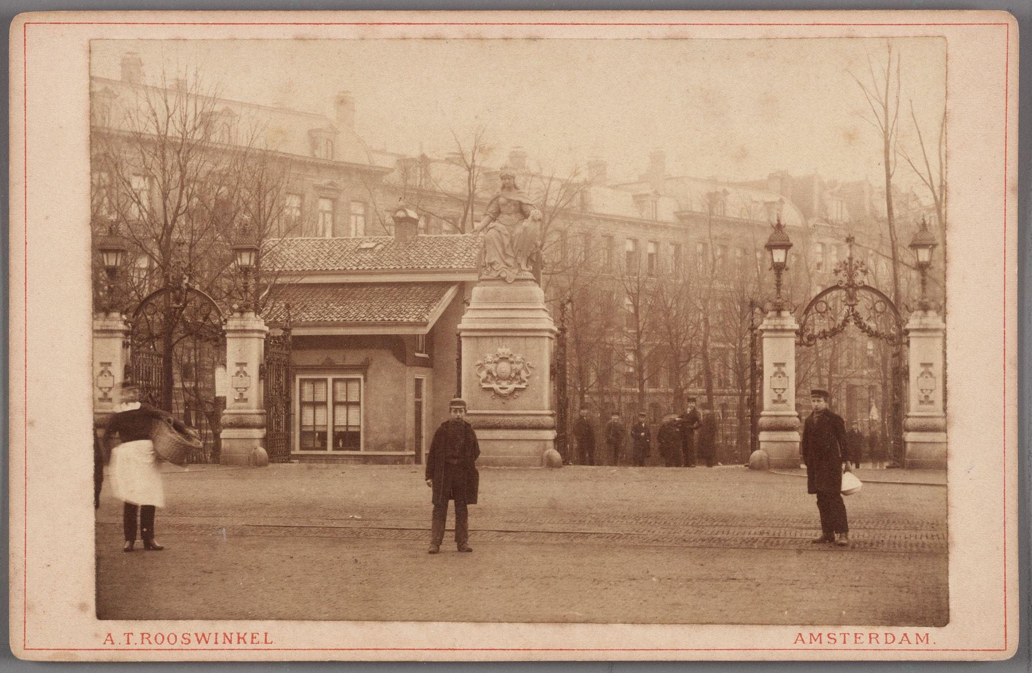 Beschrijving De hoofdingang van het Vondelpark aan de Stadhouderskade, met links op de achtergrond de huizen aan de Vossiusstraat en de opzichterwoning Vondelpark 1 Serie: Buurt en Stad Vondelpark Documenttype foto Vervaardiger Rooswinkel, A.T. Collectie Collectie Stadsarchief Amsterdam: kabinetfoto's Datering 1883 ca. Geografische naam Stadhouderskade Vondelpark Inventarissen Afbeeldingsbestand 010005000801 Generated with Dememorixer